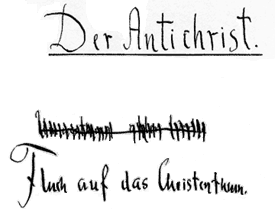 Titre de l'Antéchrist écrit par Nietzsche. Sous la rature, en Allemand : Inversion des valeurs. Preuve que Nietzsche avait abandonné l'idée de ce livre.